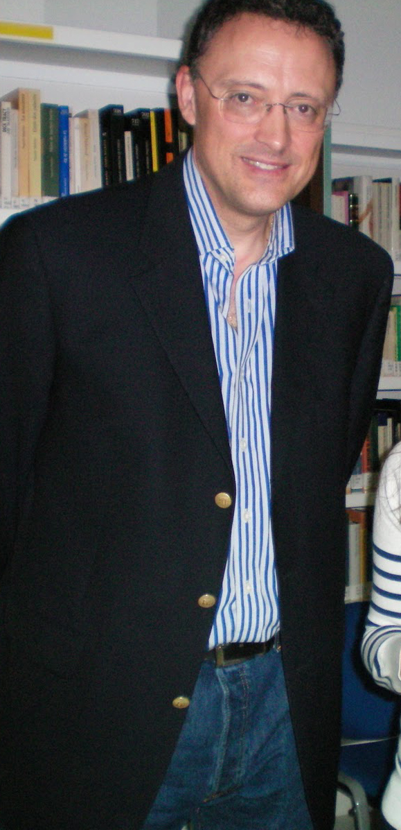 Luis Leante, escritor murciano afincado en Alicante.